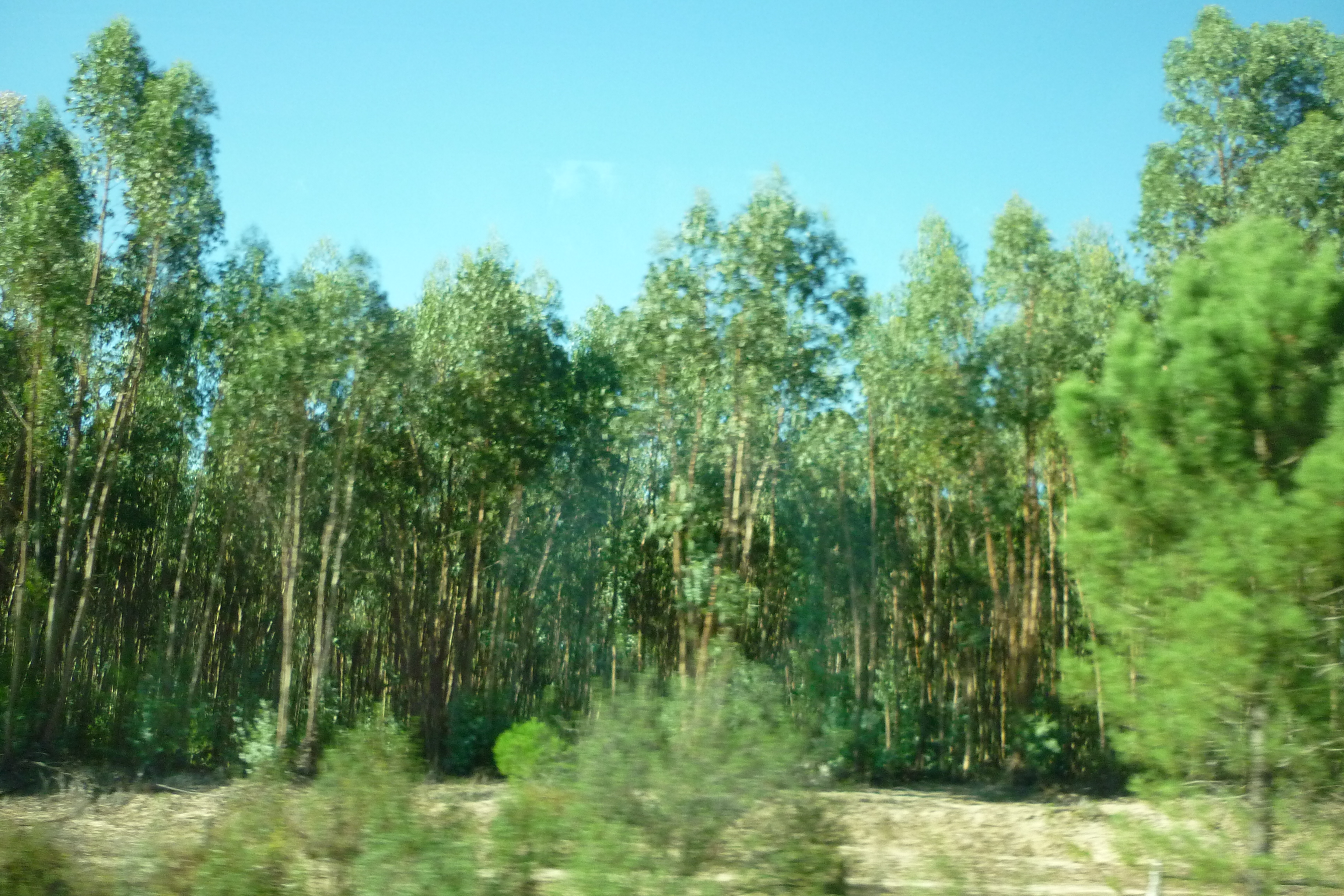 Eucalyptusbos